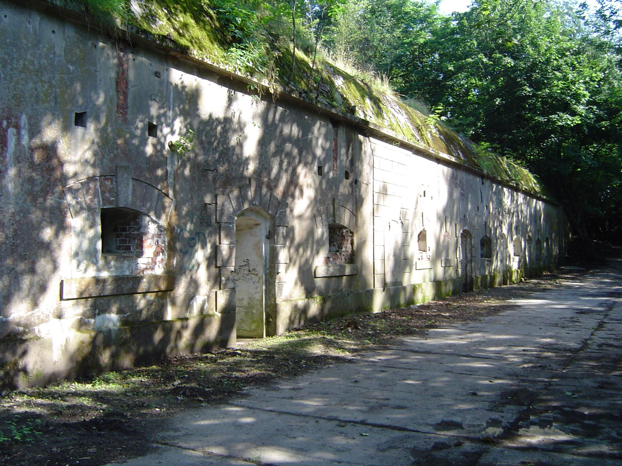 Fort Tarpno w Grudziądzu